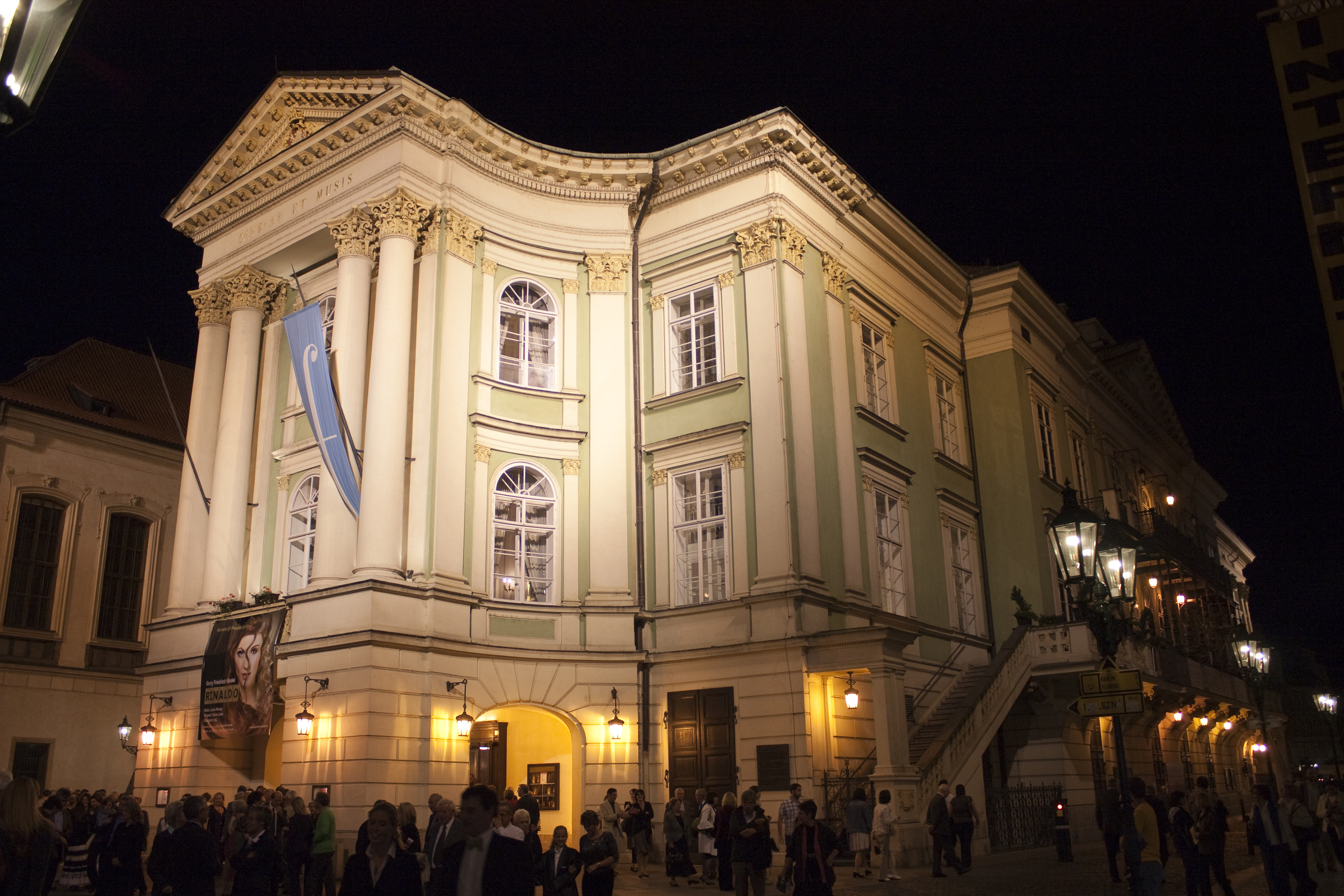 Vue nocturne du Théâtre des États, prise durant l'entracte d'une représentation de Don Giovanni donnée le 23 Mai 2009.